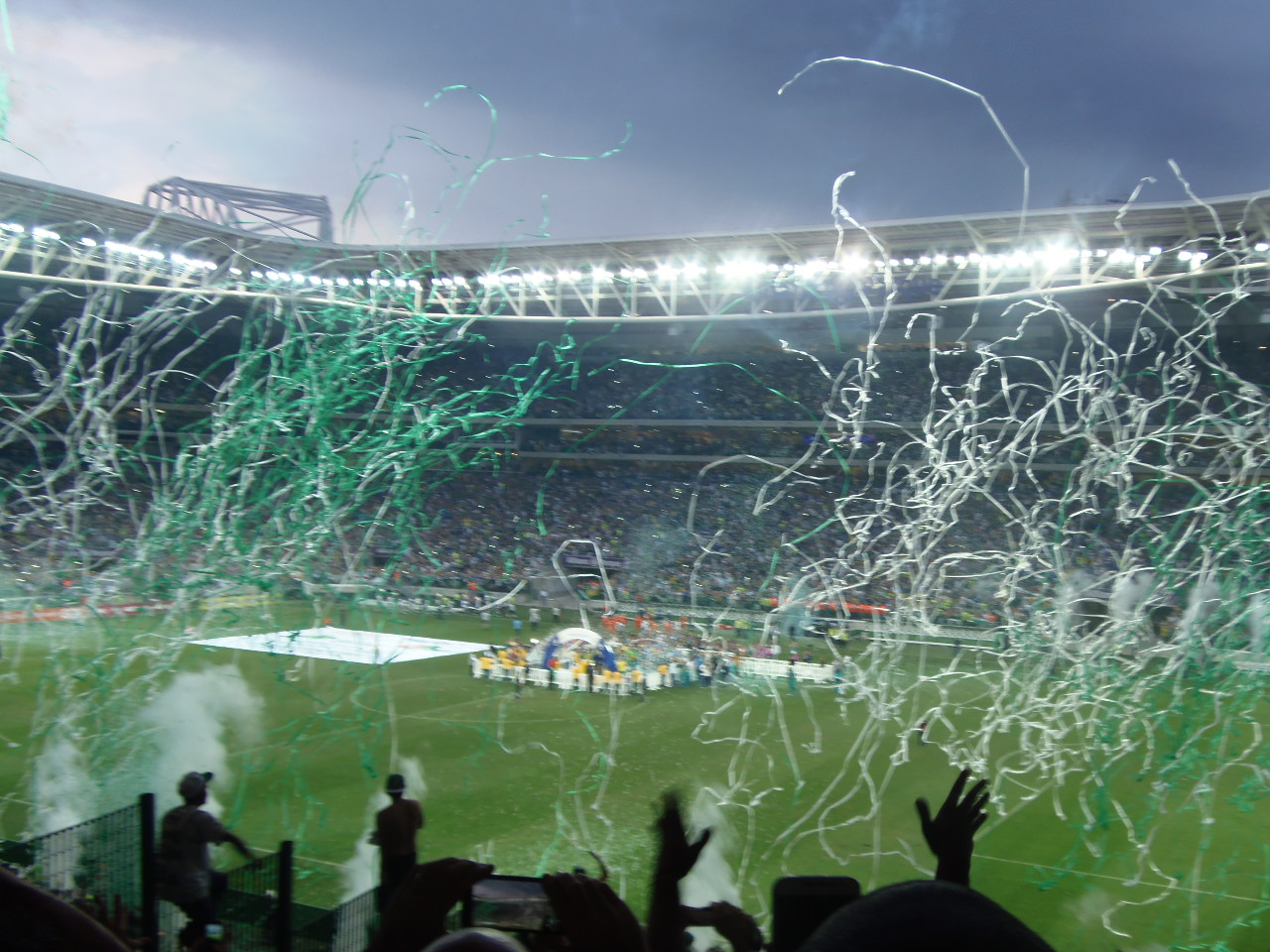 Festa do Palmeiras no Allianz Parque após a conquista do 9 Campeonato Brasileiro de sua história